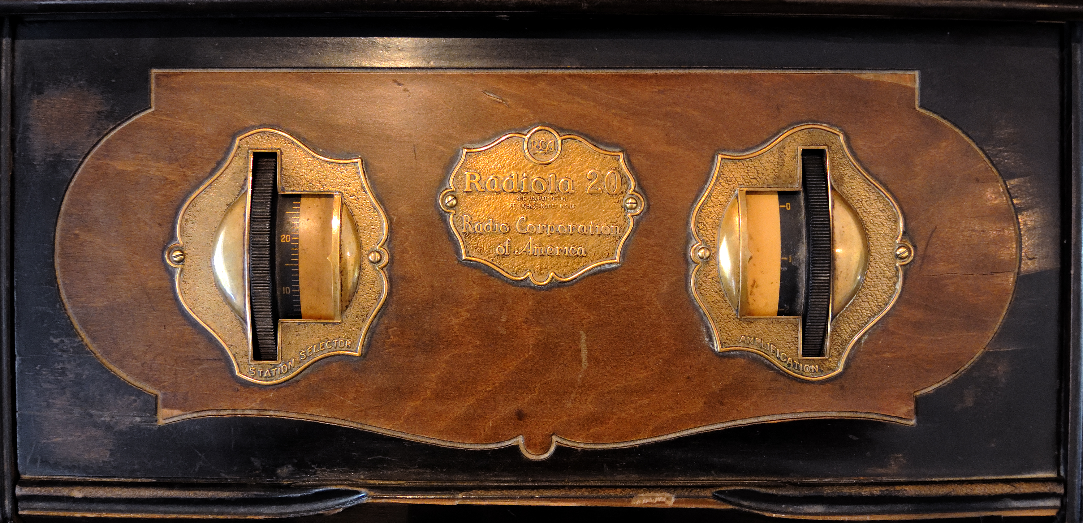 Detalle radio RCA Radiola 20, en el Museo de Trelew, Argentina